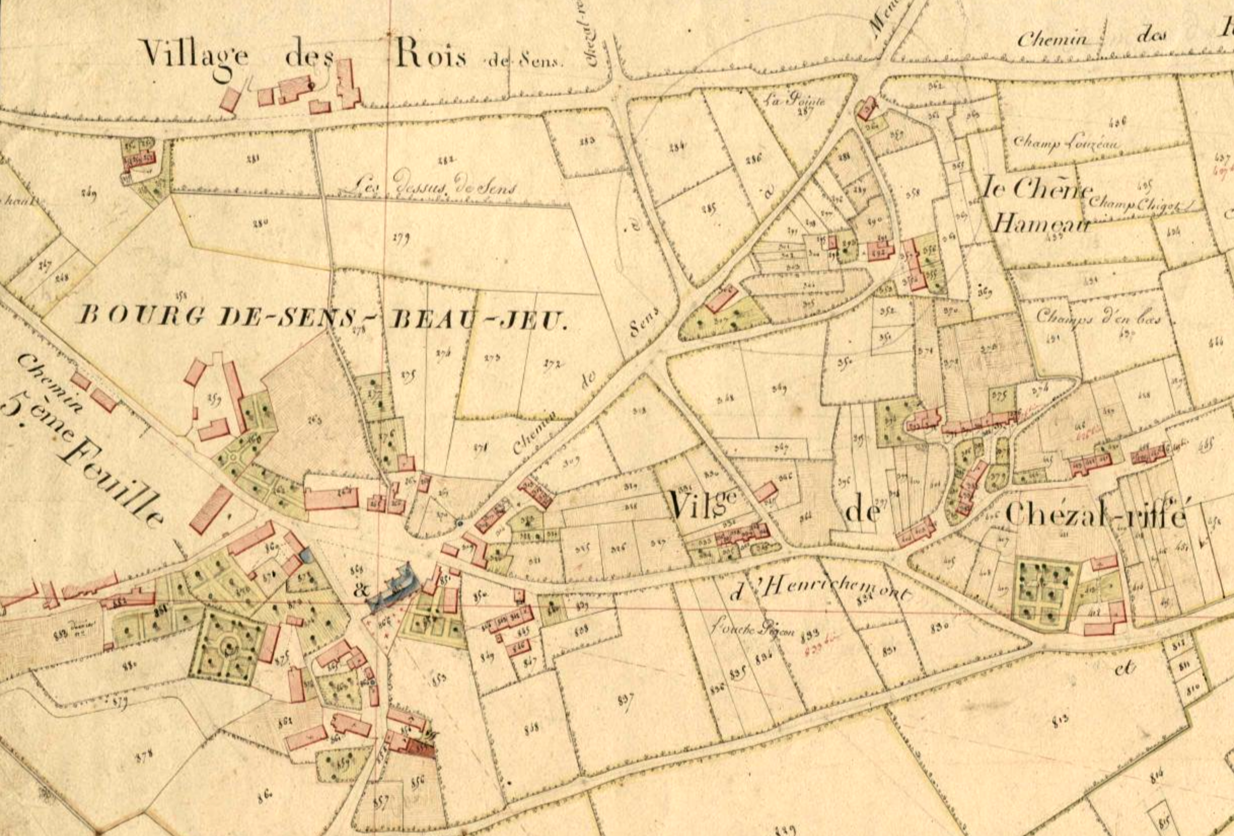 Extrait du plan du cadastre napoléonien de Sens-Beaujeu | Archives départementales du Cher - 3P 2688/08 - Section B3 du Bourg